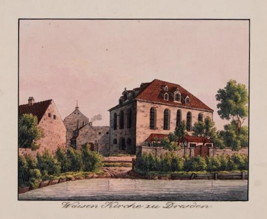 kolorierte Lithographie der 2. Waisenhauskirche in Dresden: "Die Waisenhauskirche in Dresden, Blick über den Jüdenteich nach Norden"